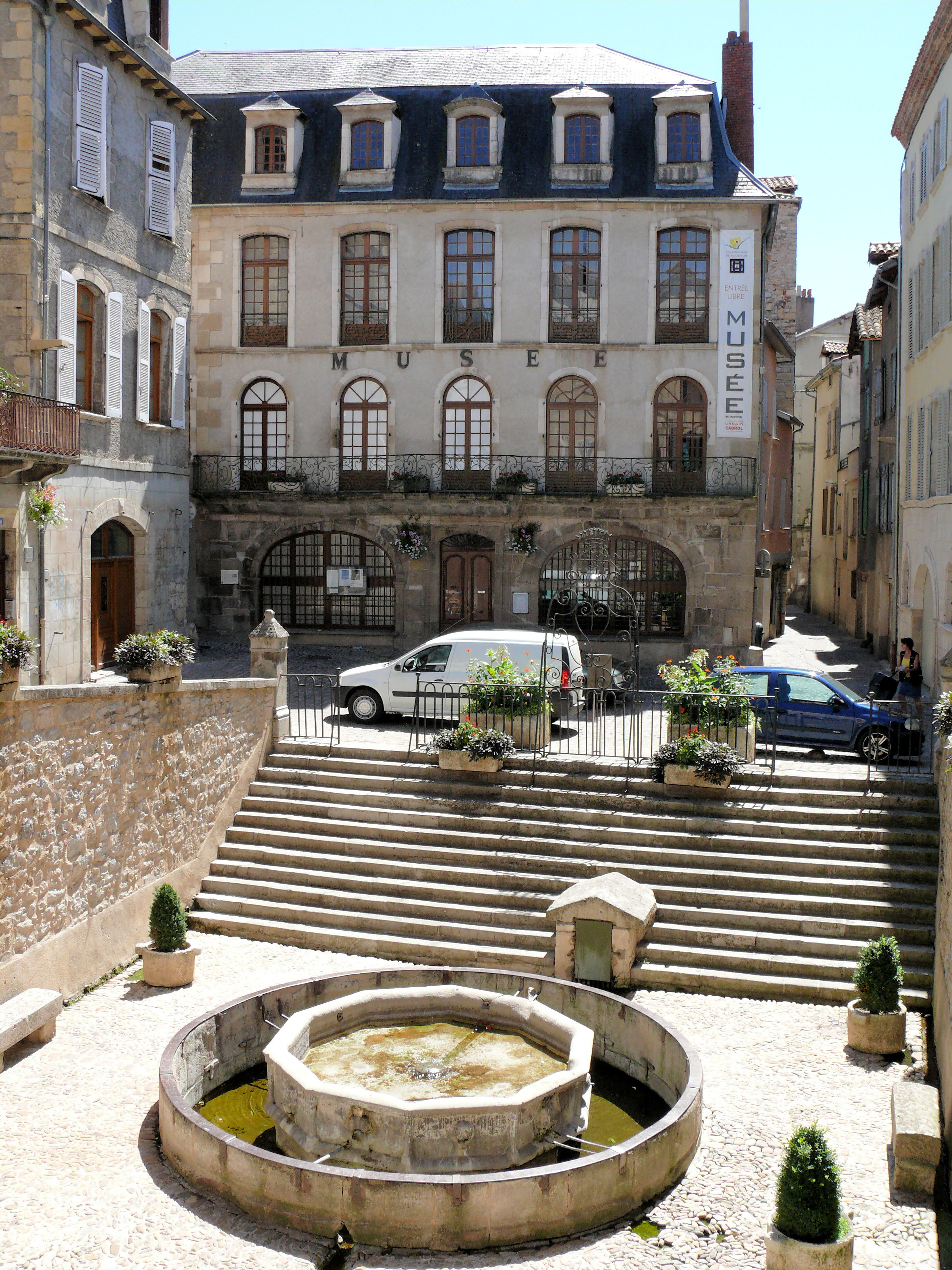 Villefranche-de-Rouergue - Place de la Fontaine